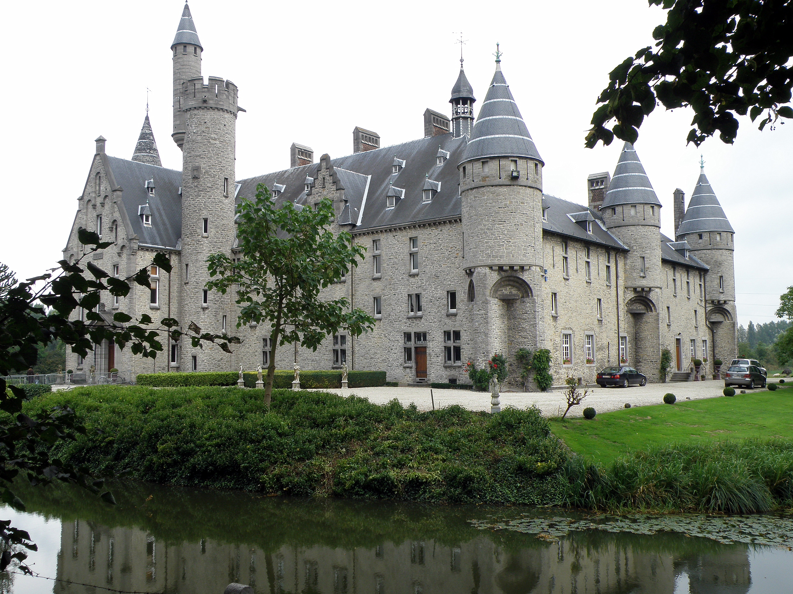 Commune de Bornem, prov. d’Anvers, Belgique. Le Château Marnix de Sainte-Aldegonde (ou château de Marnix de Sainte-Aldegonde, ou simplement château de Bornem), édifié fin XIXe selon des plans d’Henri Beyaert, sis non loin du village de Weert (comm. de Bornem). Ailes sud (à droite) et ouest (à gauche).